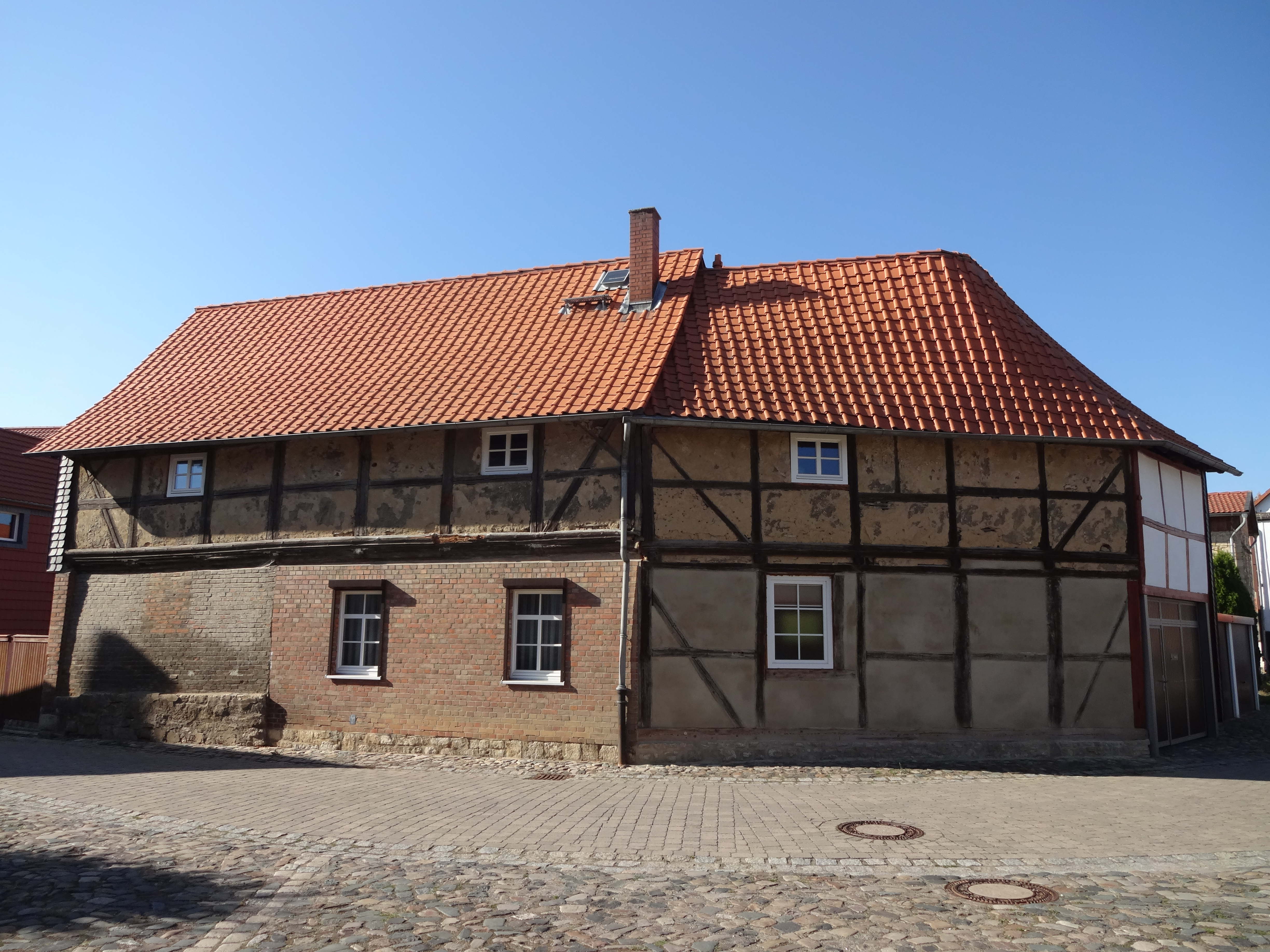 denkmalgeschütztes Wohnhaus in der Schienenstraße 65 in Zilly